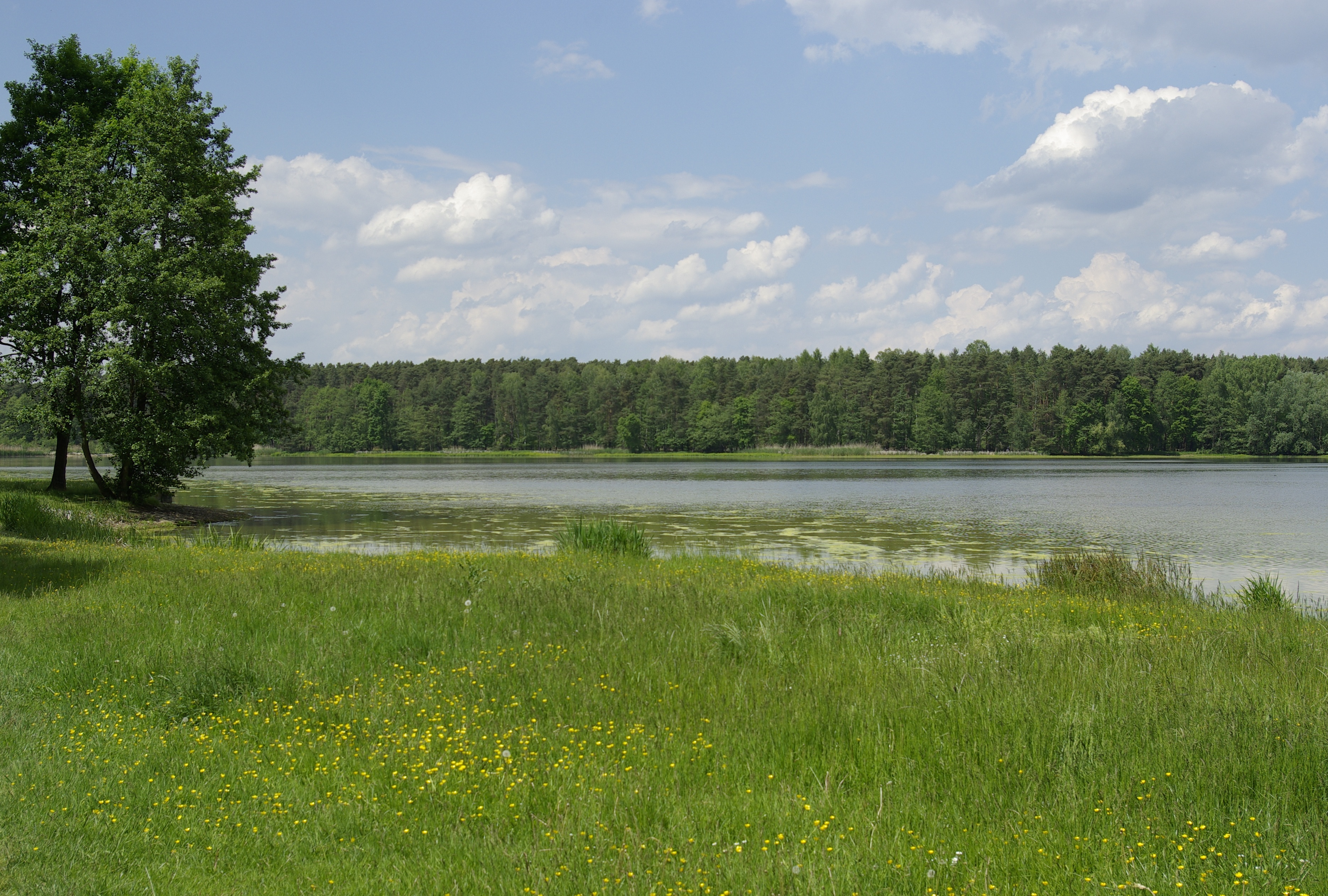 Blick zum nördlichen Ufer des Großen Bischofsweihers (Dechsendorfer Weiher). Der Wald dahinter gehört bereits zum gemeindefreien Gebiet Mark.